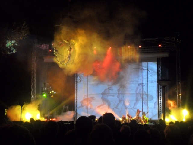 Openluchtspektakel Sneker Simmer 2011, Bolswarderpoort, Sneek